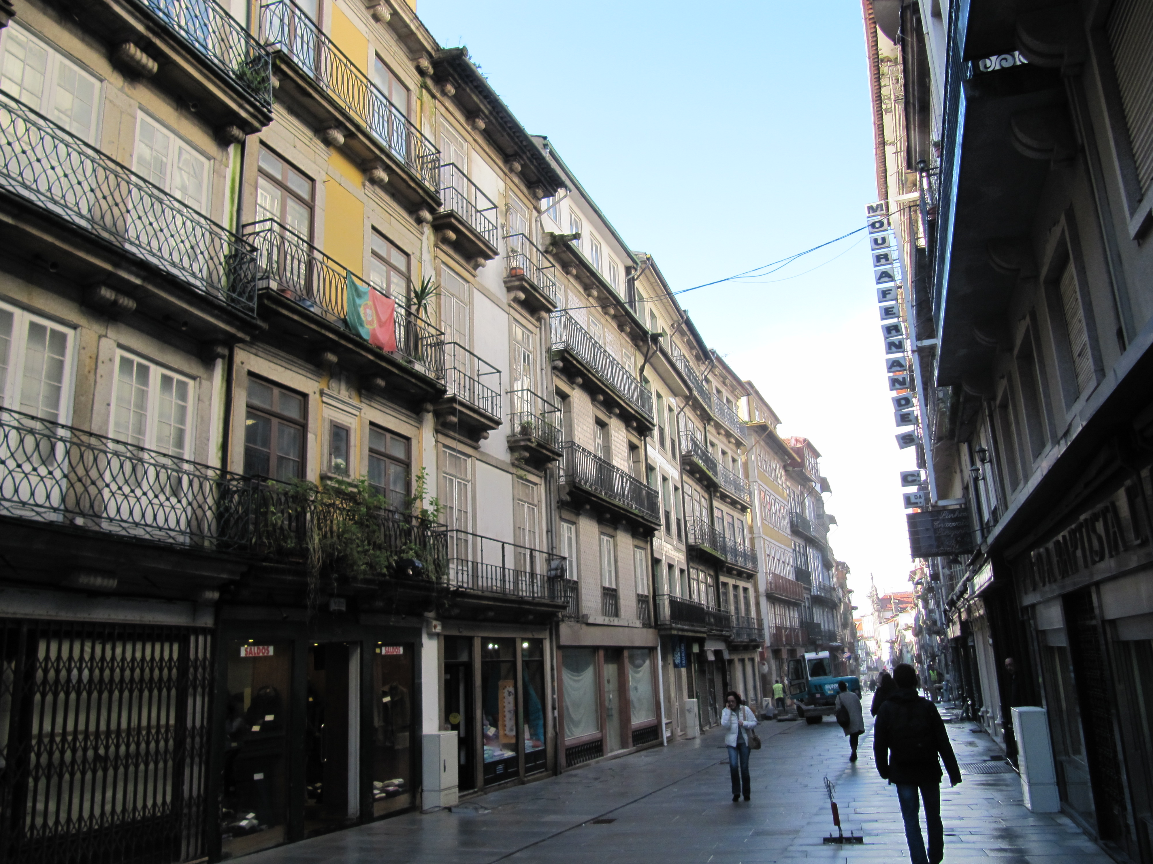 Gasse in Porto